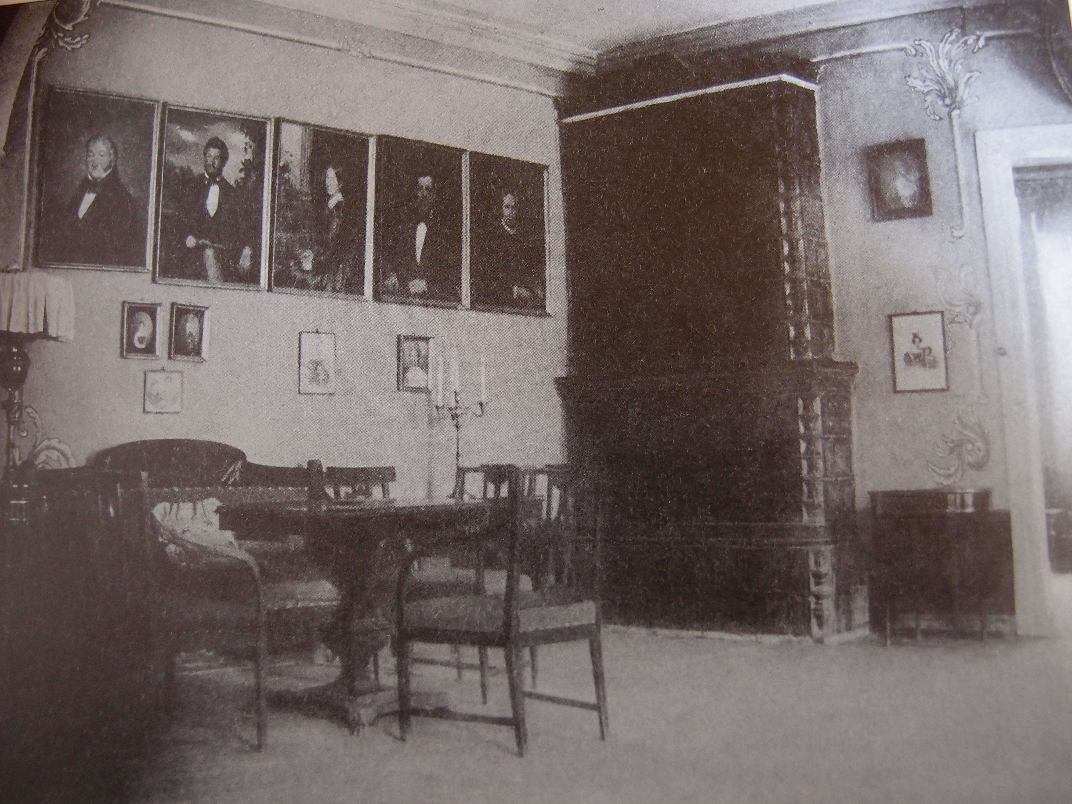 Gutshaus Orellen in Livland, Salon (heute: Ungurmuiža, Bezirk Pārgauja, Lettland) Datum: Anfang 20. Jahrhundert Urheber: unbekannt Quelle: "Gutshof unter den Eichen", Katalog der Ausstellung im Schlossmuseum Rundale und im Herder-Institut Marburg, 1998